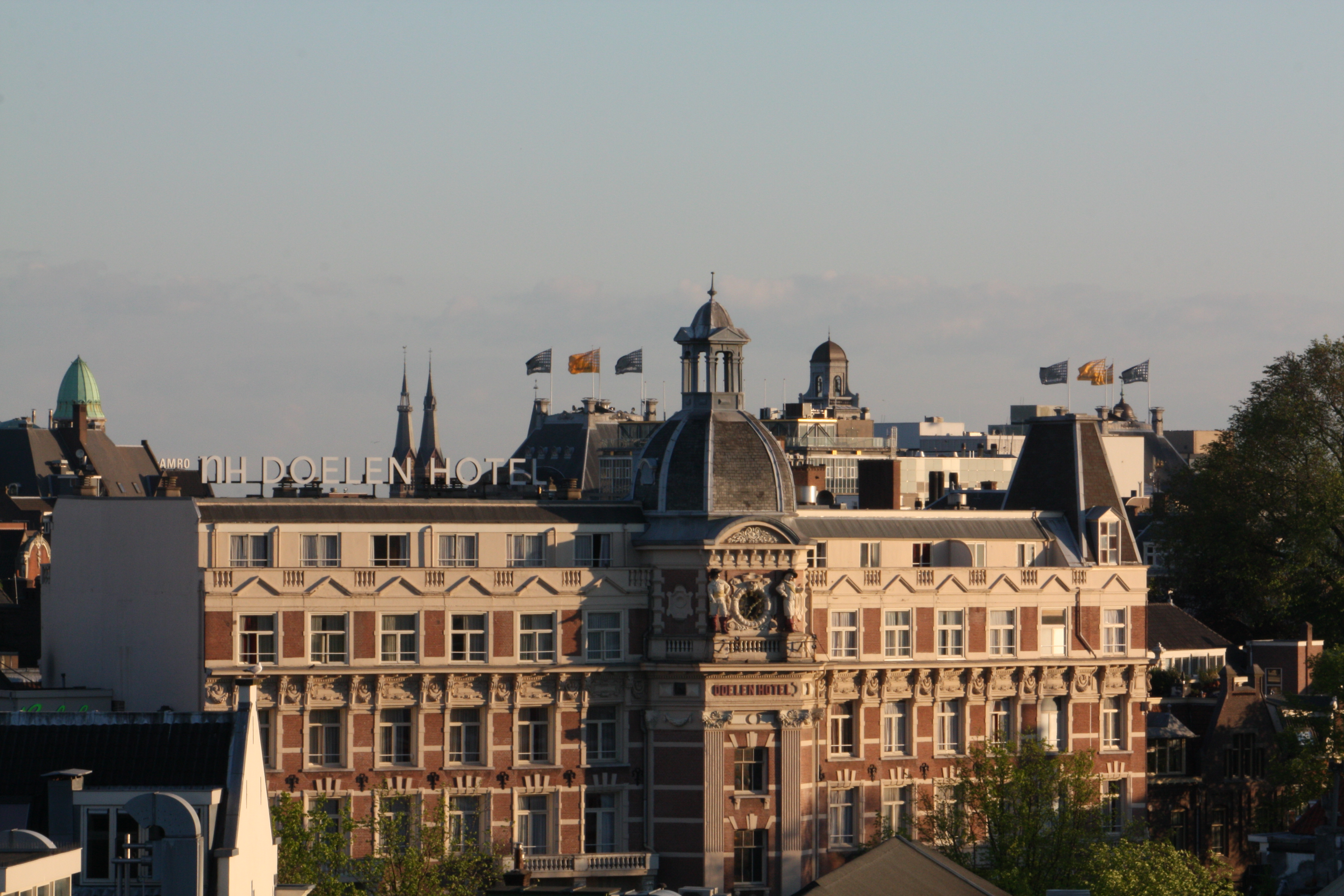 Hotel NH Doelen en la ciudad de Ámsterdam